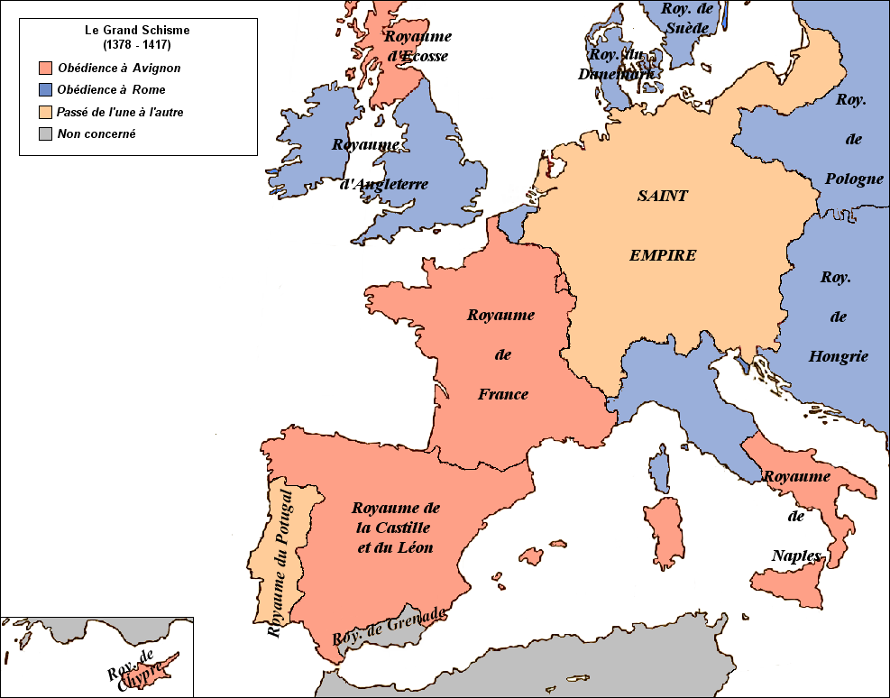 Carte historique du grand schisme d’Occident